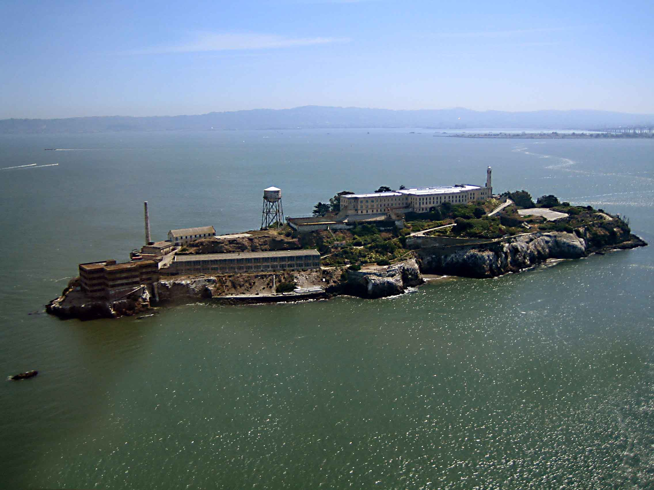 Alcatraz island